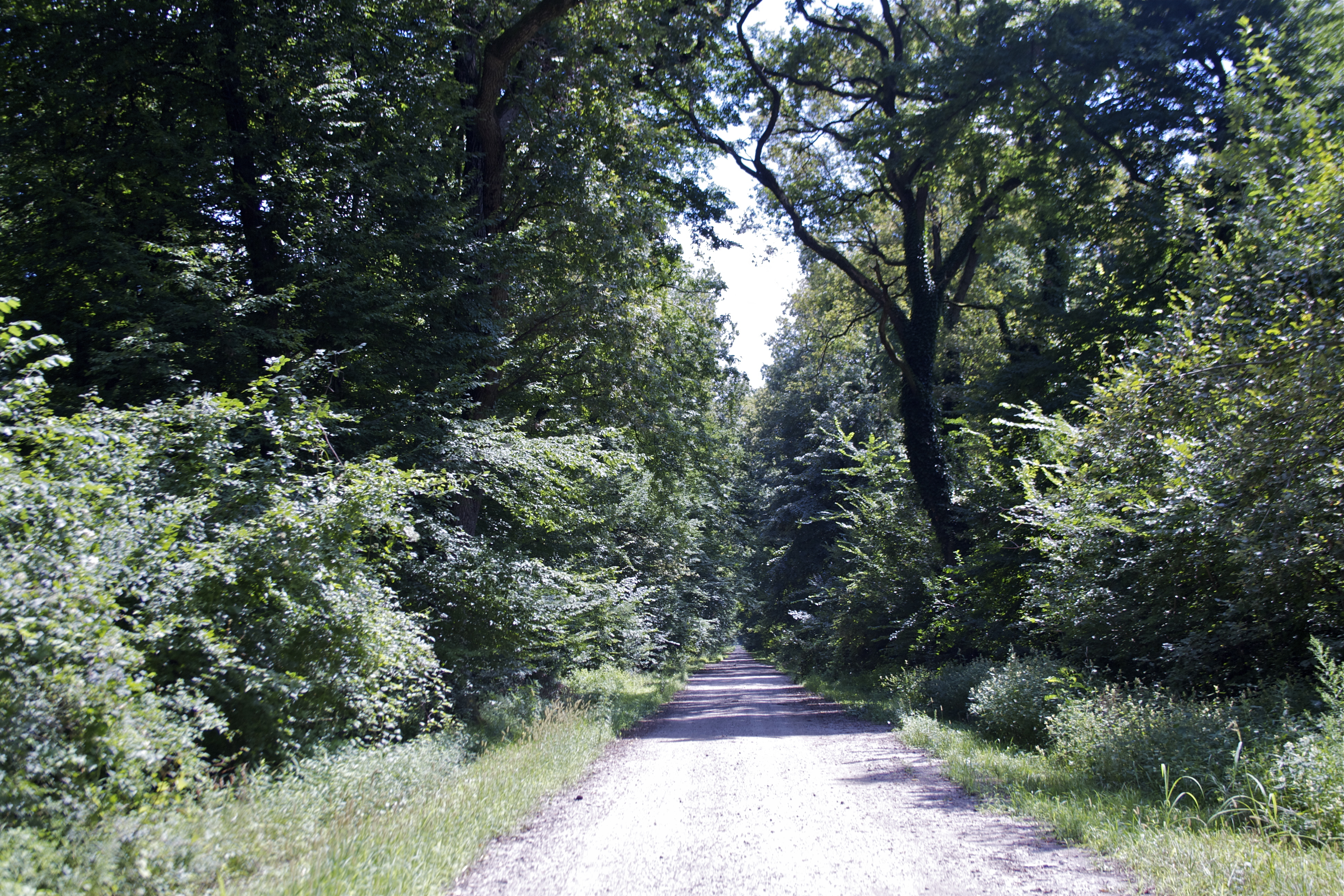 Стаза кроз Бојчинску шуму